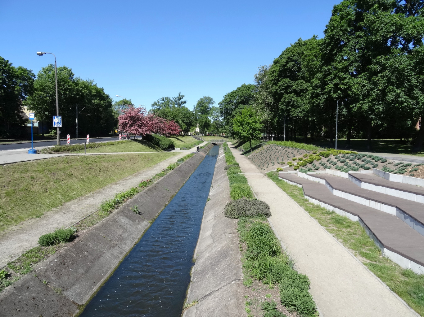 Planty nad Kanałem Bydgoskim, cześć wschodnia przebudowana w 2012 r.